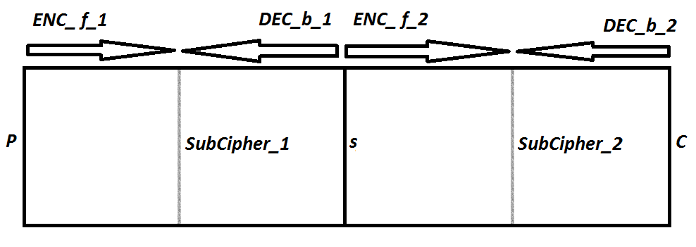 En illustration af et kryptografisk angreb kendt ved titlen: meet in the middle attack